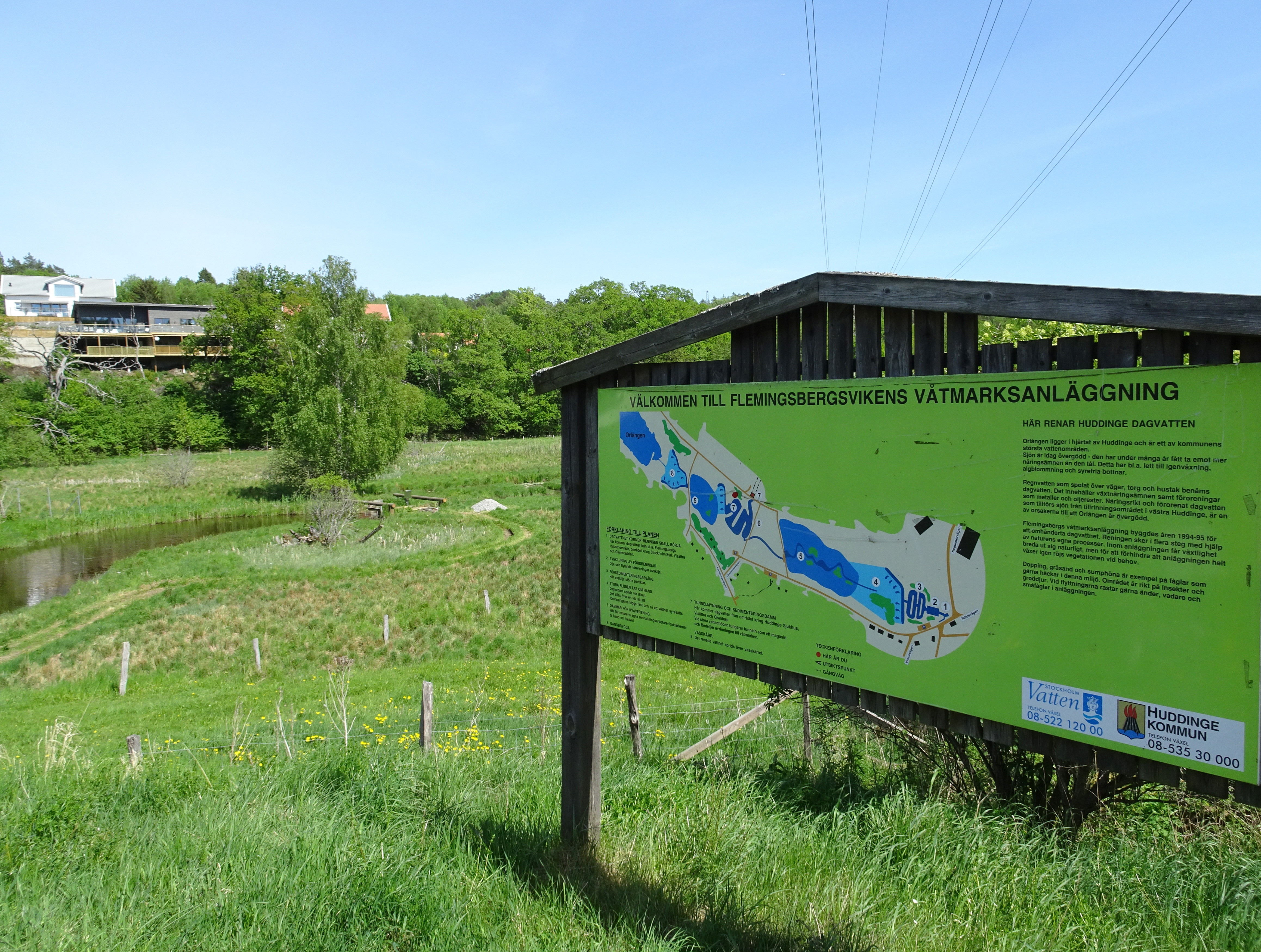 Flemingsbergsvikens våtmarksanläggning